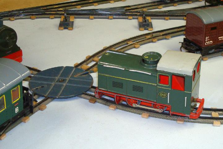 Ausschnitt einer Billerbahn Spielzeug- bzw. Modelleisenbahnanlage eines Modelleisenbahnvereines im Grossraum Bern.